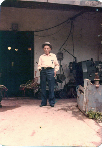 Don Luis Zambrano en su casa de Bailadores (Estado Mérida, Venezuela) quien en 1983 fuera nombrado Padrino de la 8va. Promoción de Ingenieros Industriales de la Unet: Universidad Nacional Experimental del Táchira.